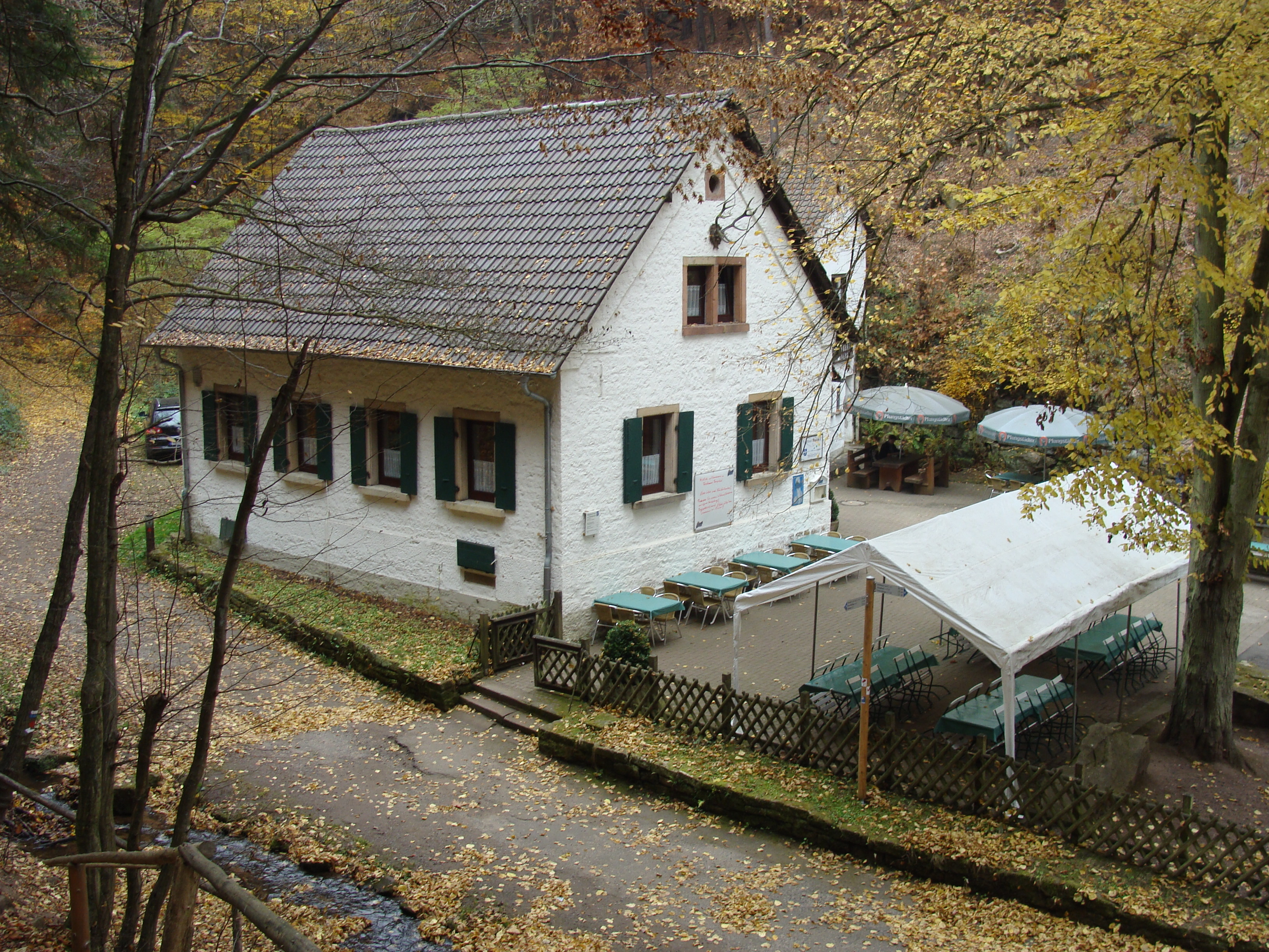 Forsthaus Benjental im Pfälzerwald